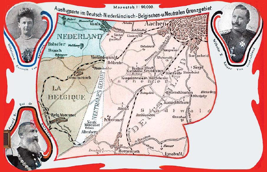 Postkarte des Neutralen Gebiets Moresnet/Altenberg